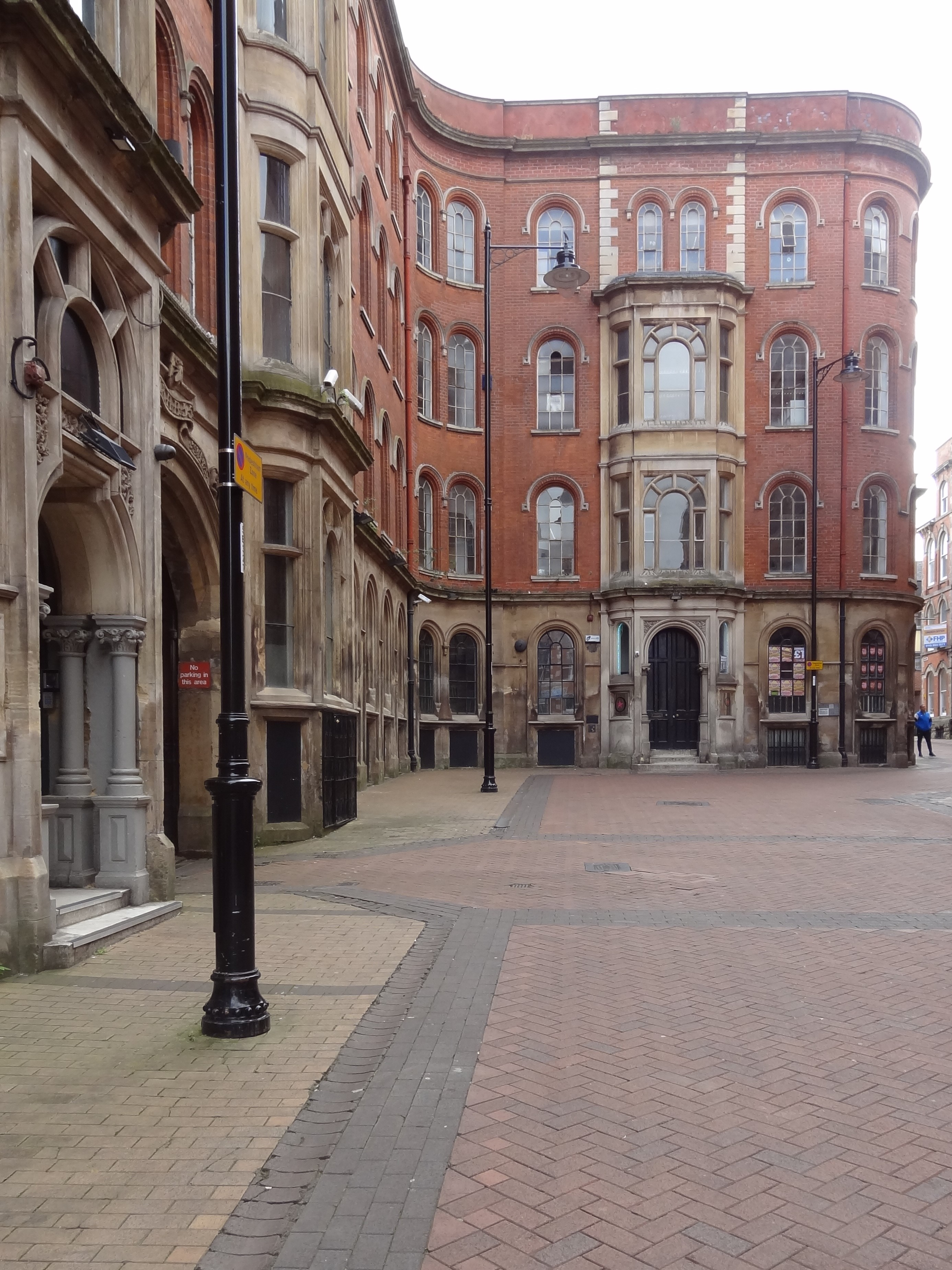 Birkin Building